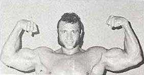 Bruiser Brody sur le programme de Big time Wrestling le 6 mars 1977.